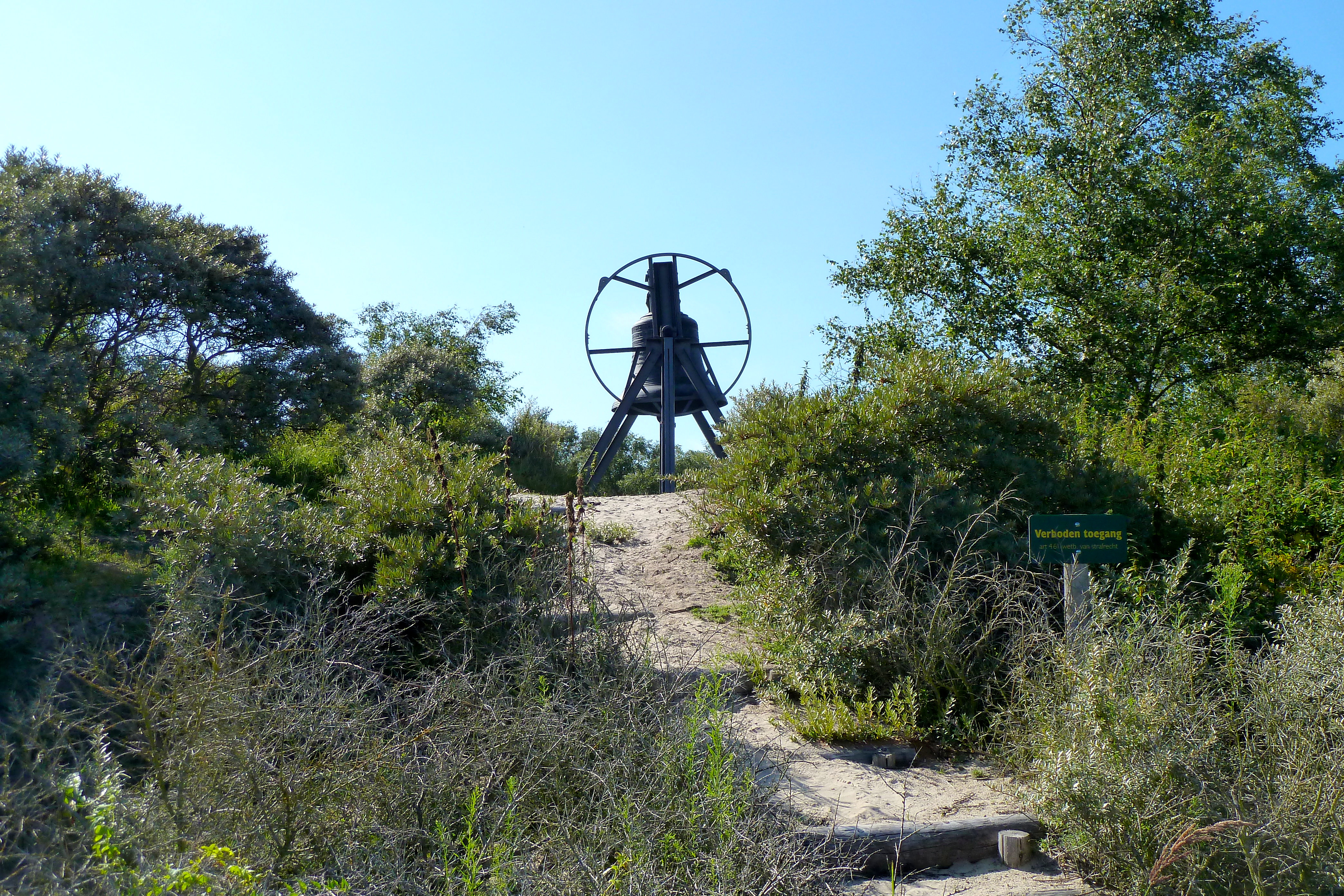 Bourdonklok op de gedenkplaats Waalsdorpervlakte